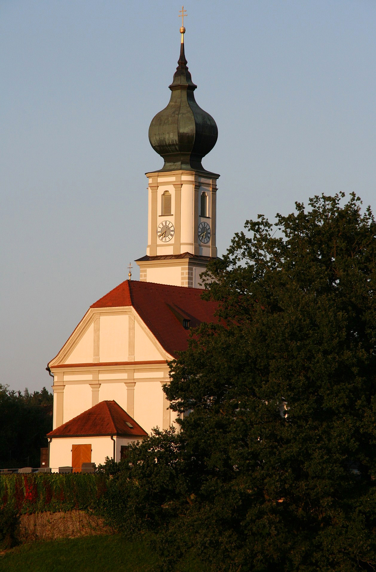 St. Martin, die katholische Pfarrkirche von Niedertaufkirchen (Landkreis Mühldorf am Inn, Oberbayern). Der ansehnliche Barockbau, errichtet 1723, steht durch die erhöhte Position reizvoll in der nördlichen Hügellandschaft des Landkreises.